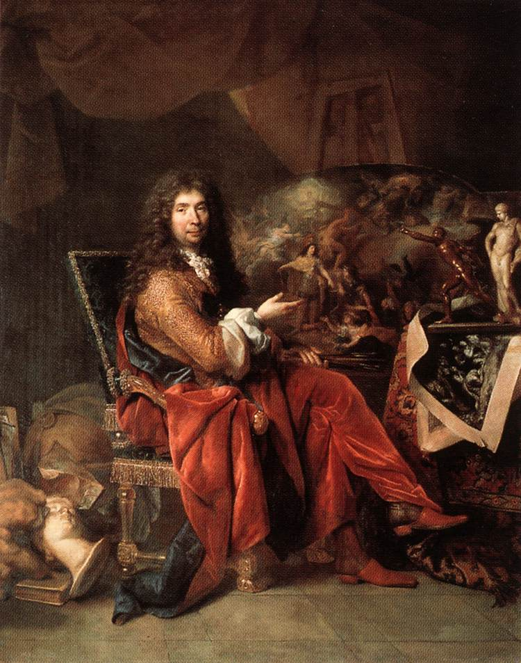 Charles Le Brun (1683-1686)label QS:Len,"Charles Le Brun (1683-1686)"label QS:Lfr,"Charles Le Brun (1683-1686)"